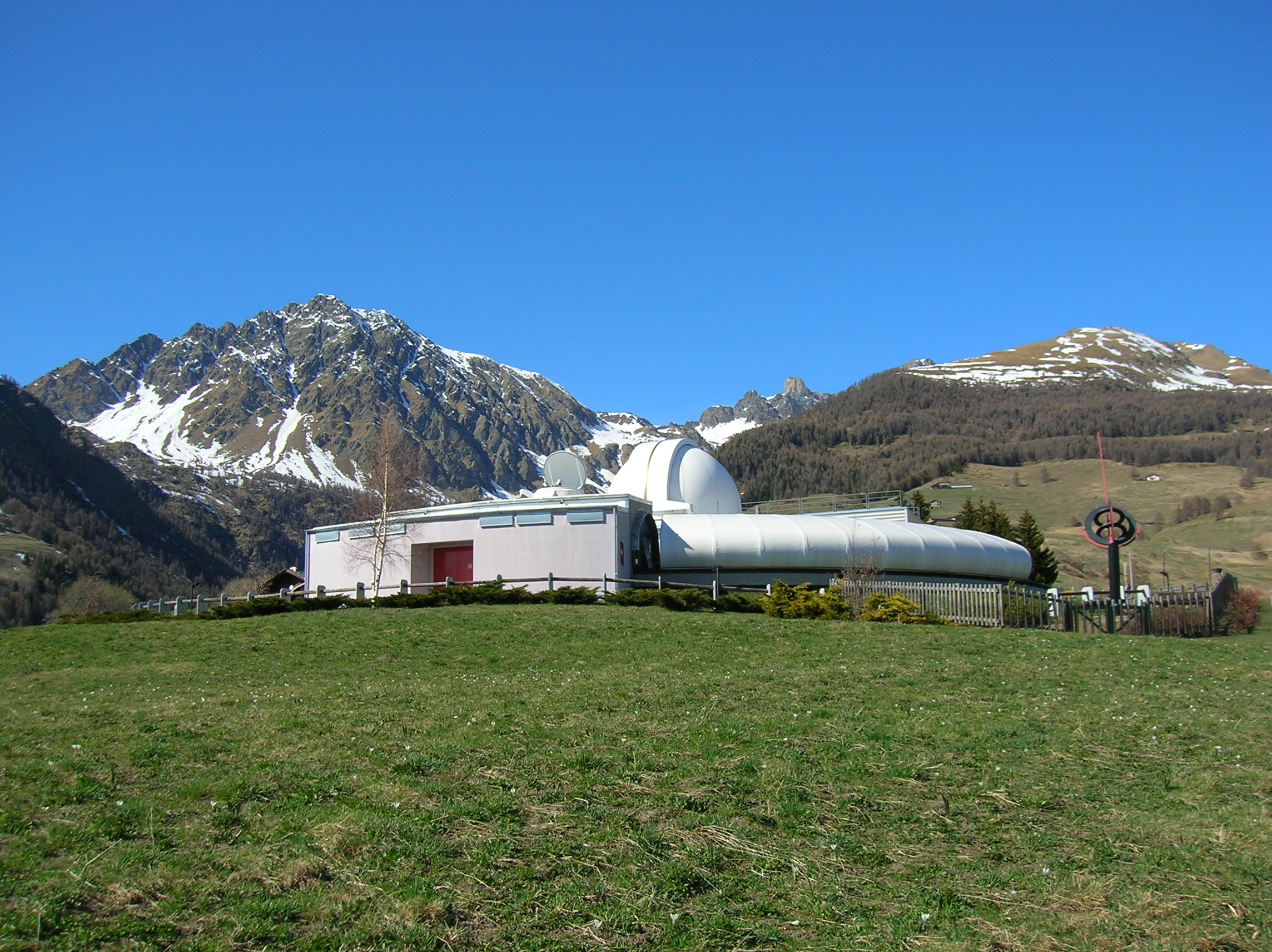 Osservatorio astronomico Fondation Clément Fillietroz: osservatorio astronomico e planetario di Saint-Barthélemy, presso la località Lignan, comune di Nus, Valle d'Aosta, Italia. E' l'Osservatorio astronomico della Regione Autonoma Valle d'Aosta.